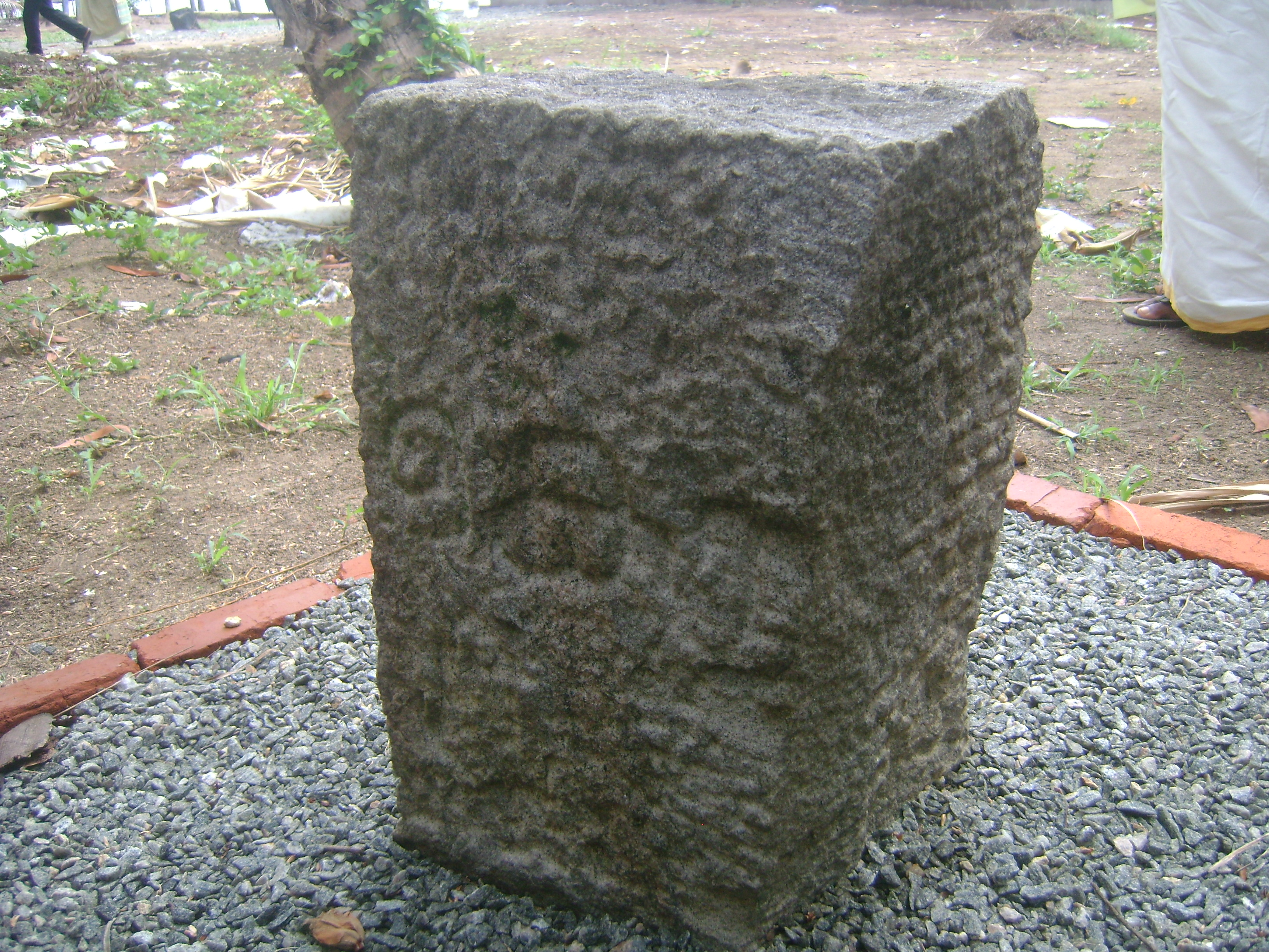 കൊച്ചിയെയും തിരുവിതാംകൂറിനെയും വേര്‍തിരിക്കുന്ന അതിര്‍ത്തിക്കല്ല്.